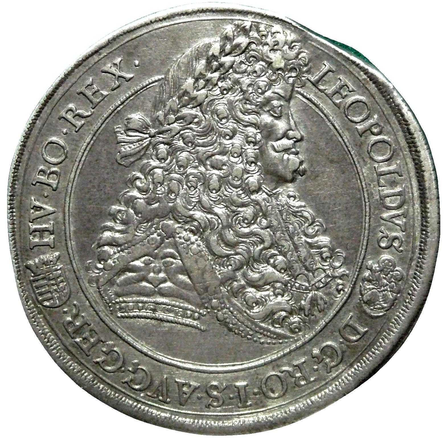 Reichsspeziestaler Breiter Taler 1692 Königreich Ungarn im Heiligen Römischen Reich Deutscher Nation Kaiser Leopold I. Wert = 90 Kreuzer = 1 ½ Gulden (Forint) Reichsmünzfuß 8 Stück a.d.r. Mark, 9Stück a.d.f. Mark Silber 14 Lot 4 Grän = 888,889‰ Feingewicht: 25,984 g Raugewicht: 29,232 g Prägung in dieser Variante nur 1692 Münzstätte Körmöczbánya (Kremnitz) Außerkurssetzung nach Einführung des Konventionsmünzfußes 1748 für 1 Taler 11 Groschen Konventionsgeld Gewicht: 28,80 g Durchmesser: 46,69-47,35 mm Dicke: 2,05 mm Zainende Kante glatt großes Brustbild des Kaisers mit Allongeperücke und Lorbeerkranz im antikem Prunkharnisch mit Kette vom Goldenen Vlies und goldenen Widderfell, Titelumschrift zwischen zwei Zierkreisen - unterbrochen links von gekröntem hochgeteilten Wappenschild mit Wappen von Ungarn und rechts Madonna mit Kind - oben beginnend nach rechts: LEOPOLDVS DEI GRATIA ROMANORUM IMPERATOR SEMPER AUGUSTUS GERMANIAE HUNGARIAE BOHEMIAE REX = Leopold von Gottes Gnaden Römischer Kaiser, zu allen Zeiten Mehrer des Reichs, König in Germanien, Ungarn und Böhmen